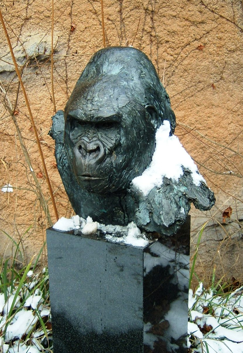 Büste Gorilla "Matze", Eingang zum Affenhaus, Bronzeskulptur von Wolfgang Weber